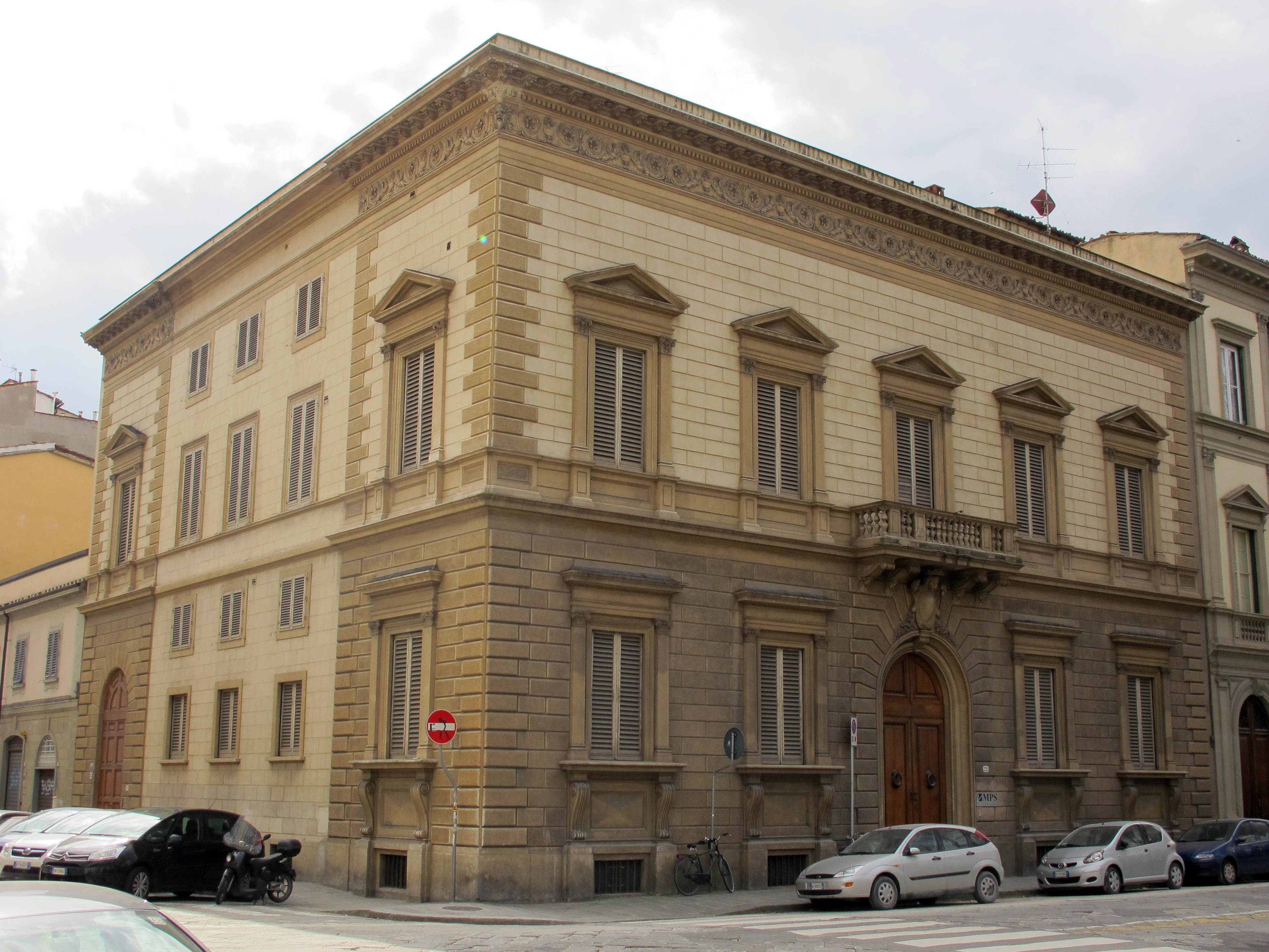 Piazza d'azeglio 22, palazzina carandini